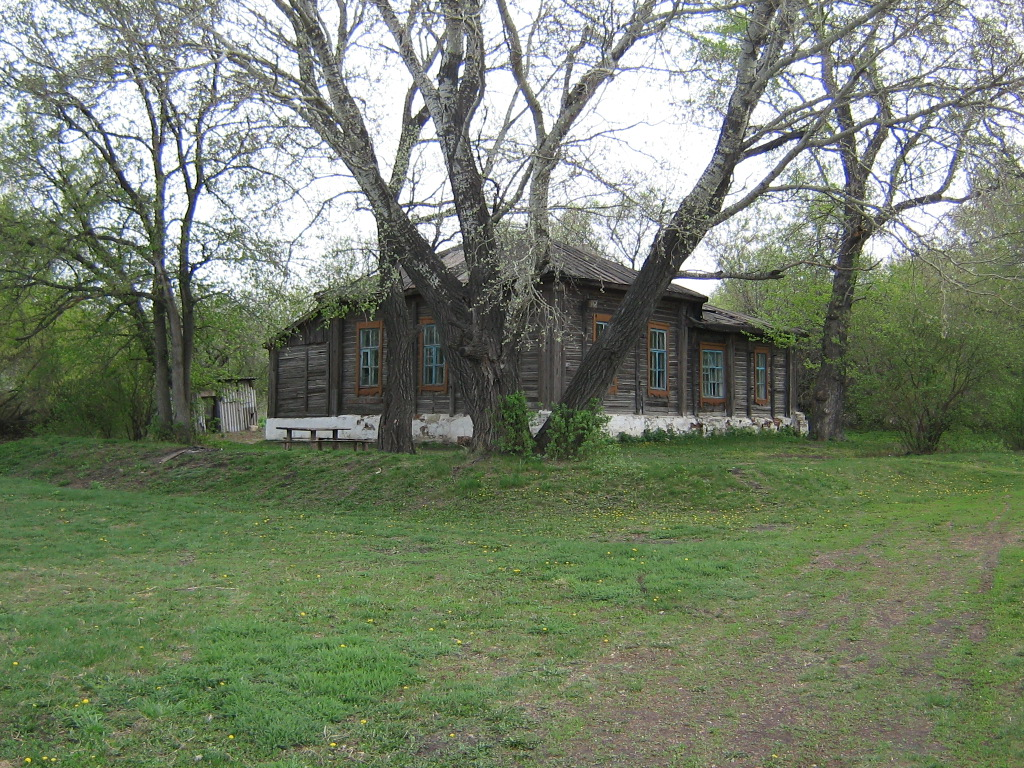 Павловская начальная школа. Бывшая земская школа. Закрыта.